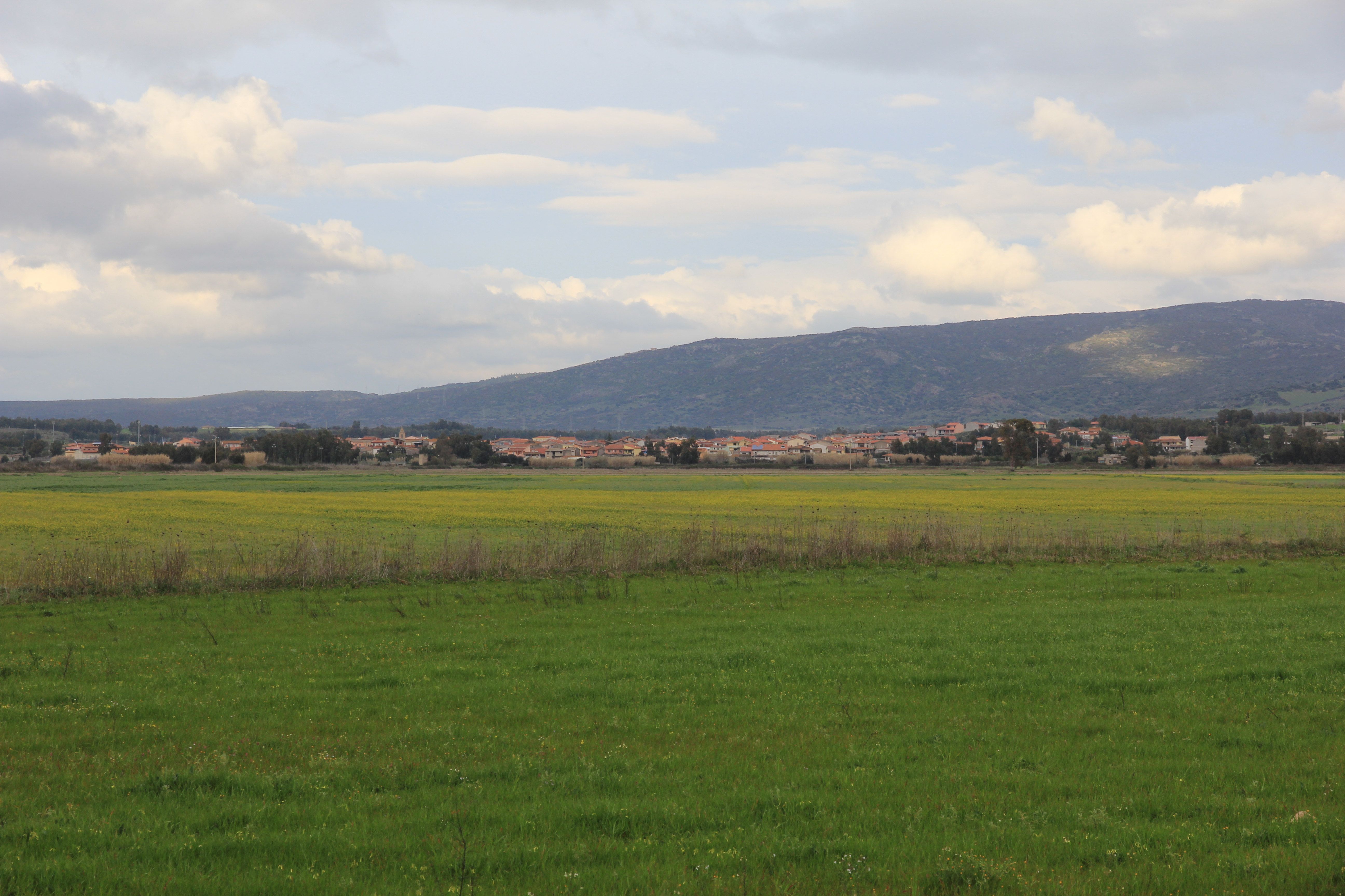 Simaxis - San Vero Congiu